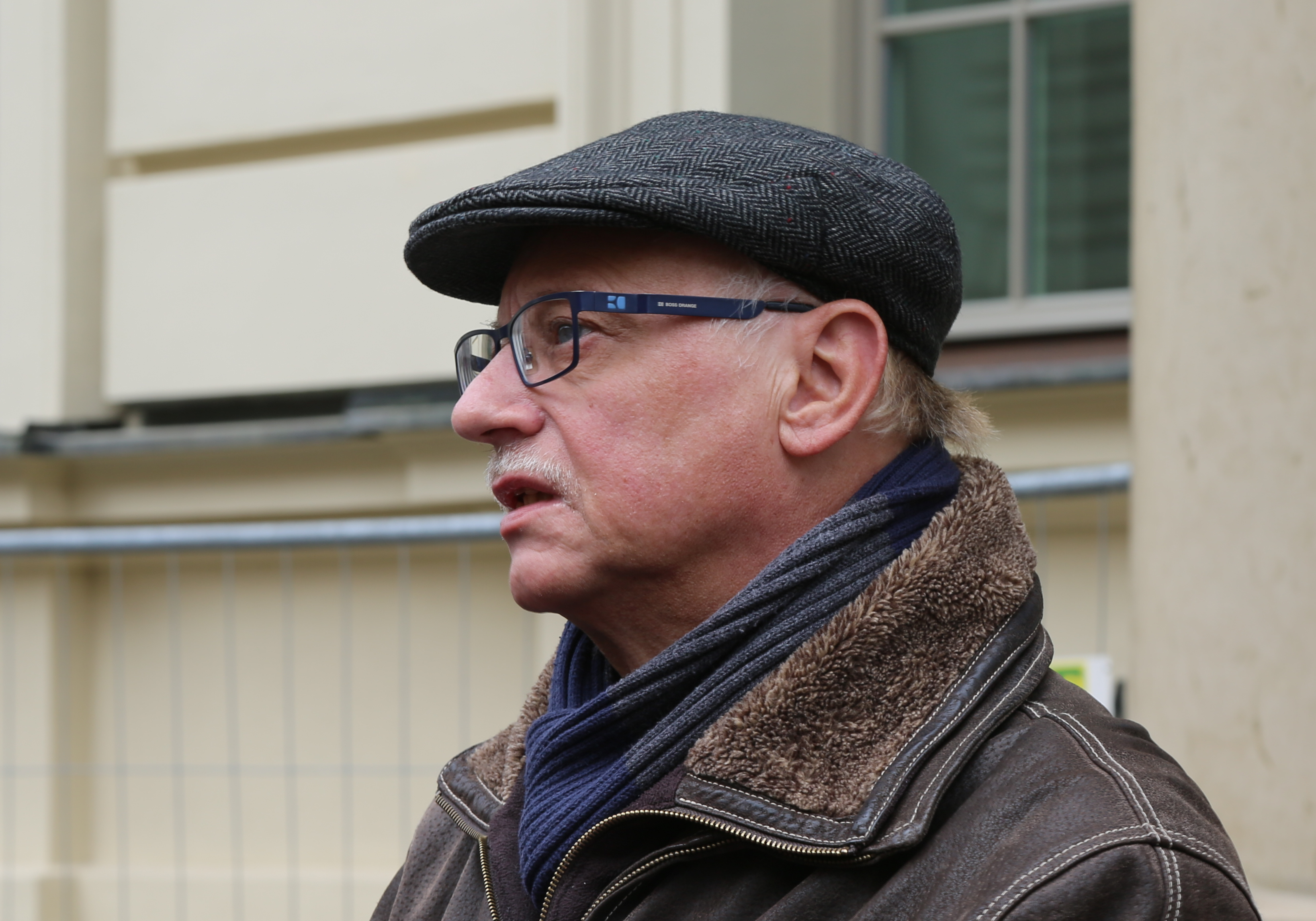 Rudolf Stumberger (*1956), Soziologe und Autor